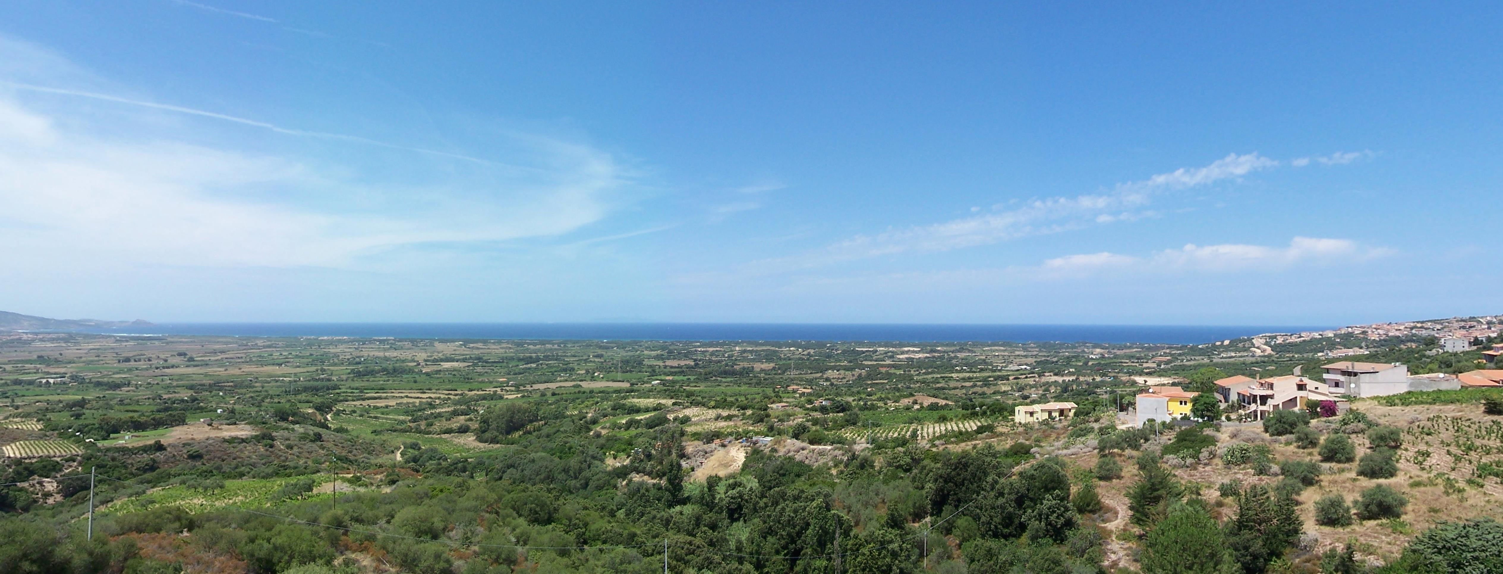 Il Golfo dell'Asinara